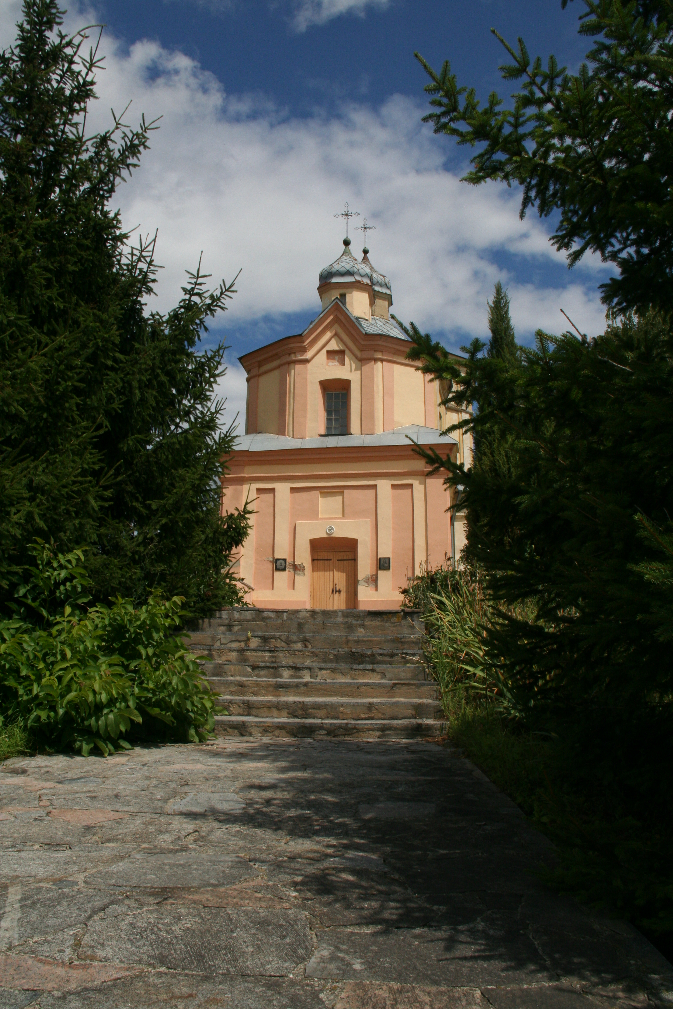 Церква у с.Поличинці Вінницької обл., 18 ст. - пам'ятка архітектури національного значення.